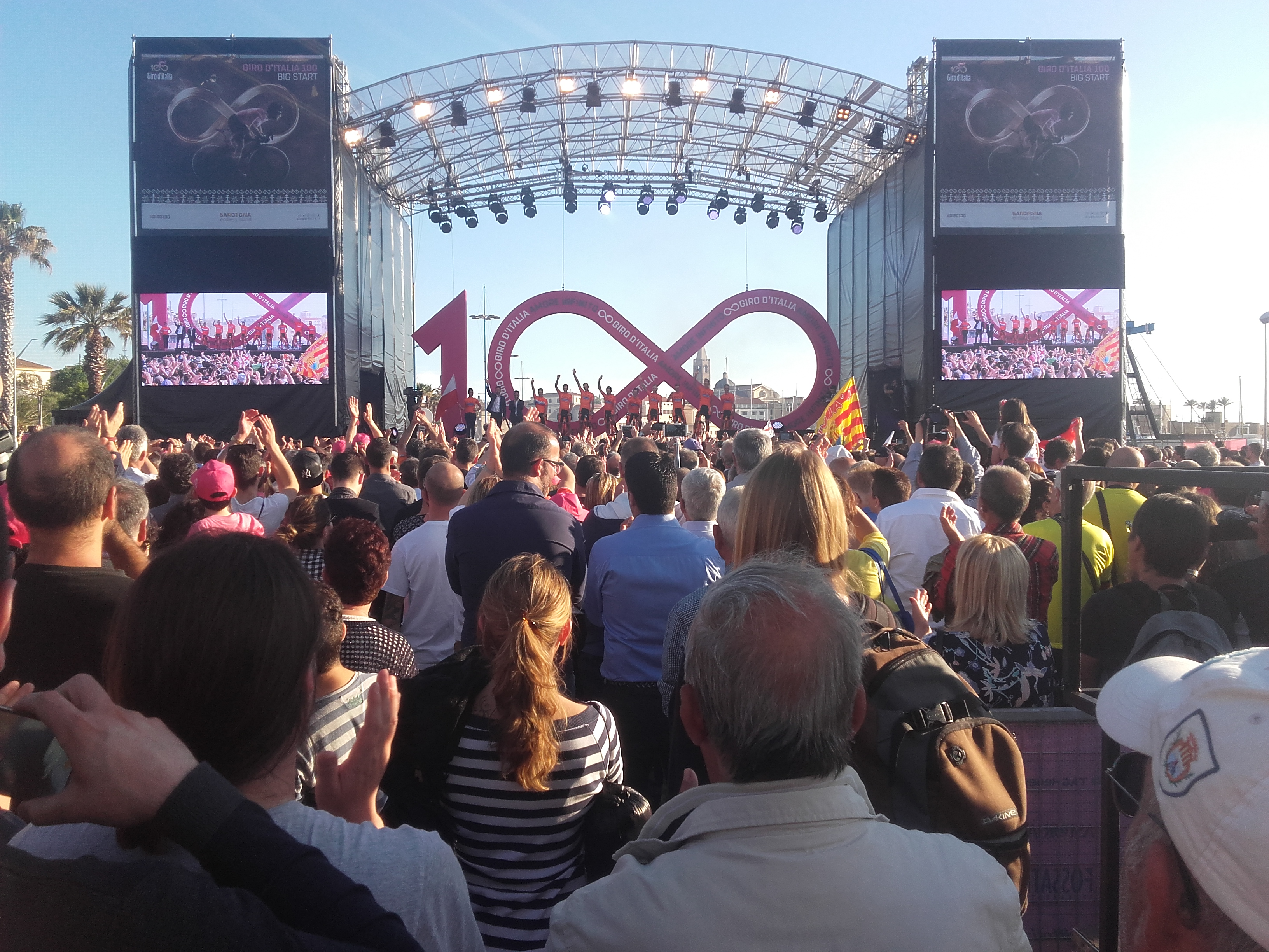 Il Palco dove il 05/05/2017 prenderà il via il Giro d'Italia numero 100 allestito nel porto di Alghero